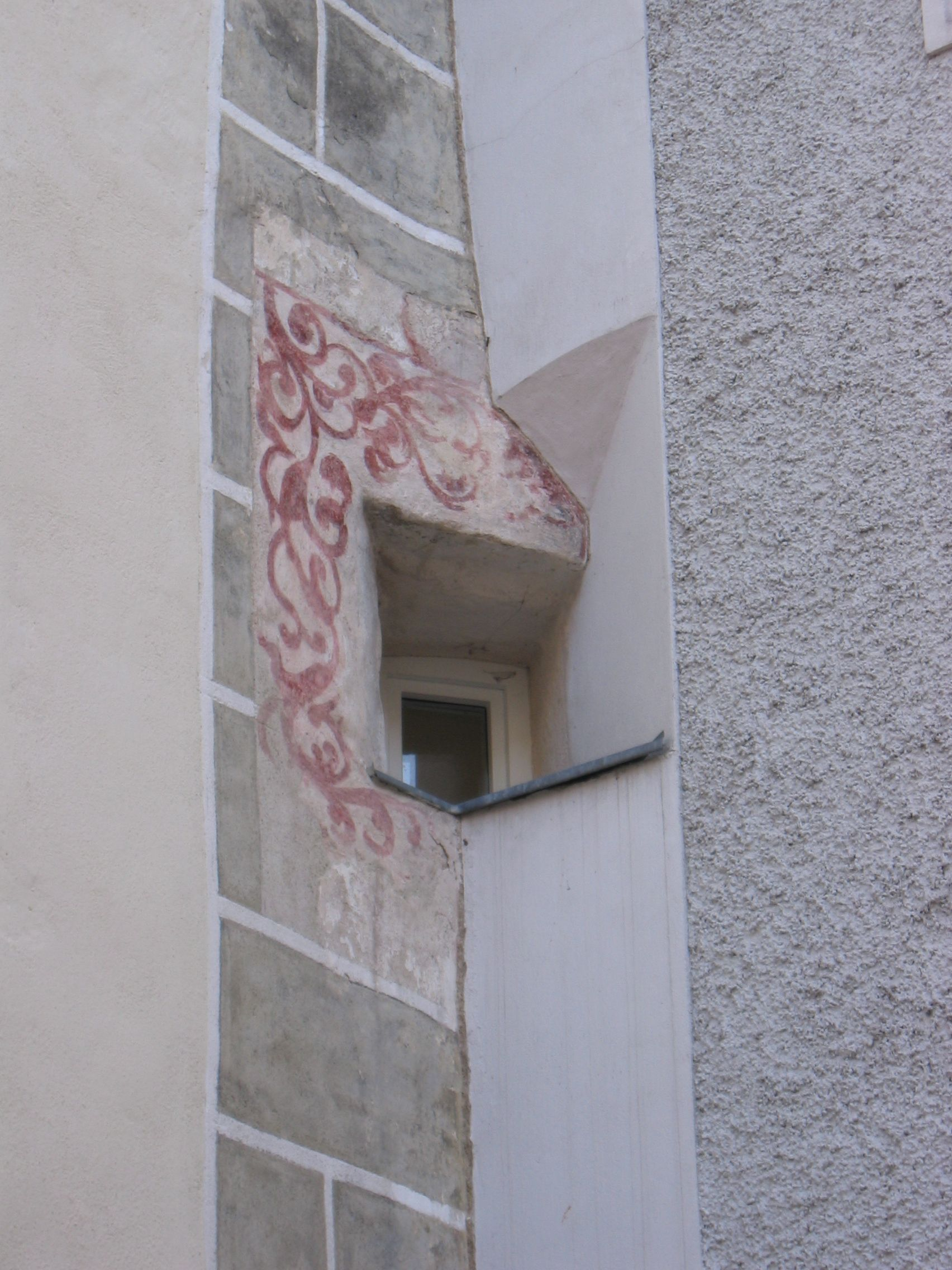 Kleines Guckloch am Pfarrplatz in Freistadt